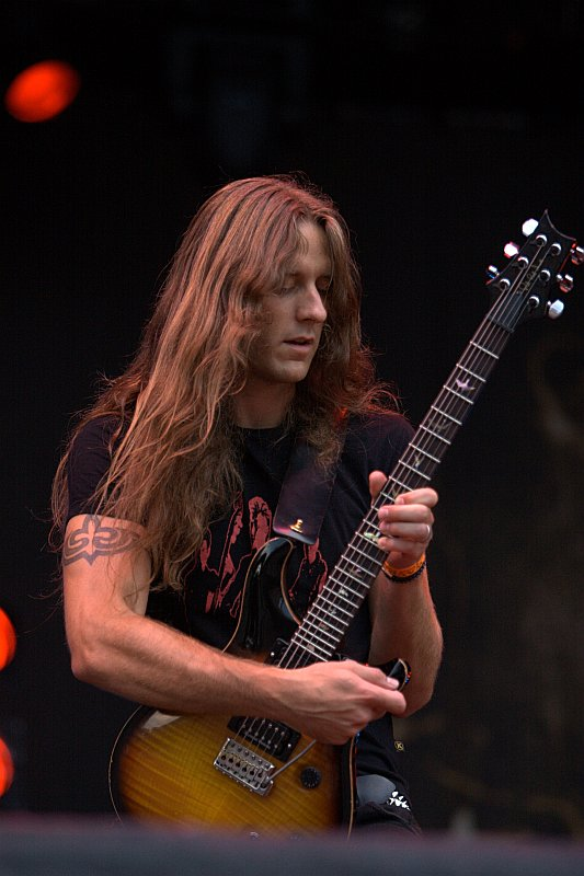 Peter Lindgren under en koncert på Wacken Open Air 2006.